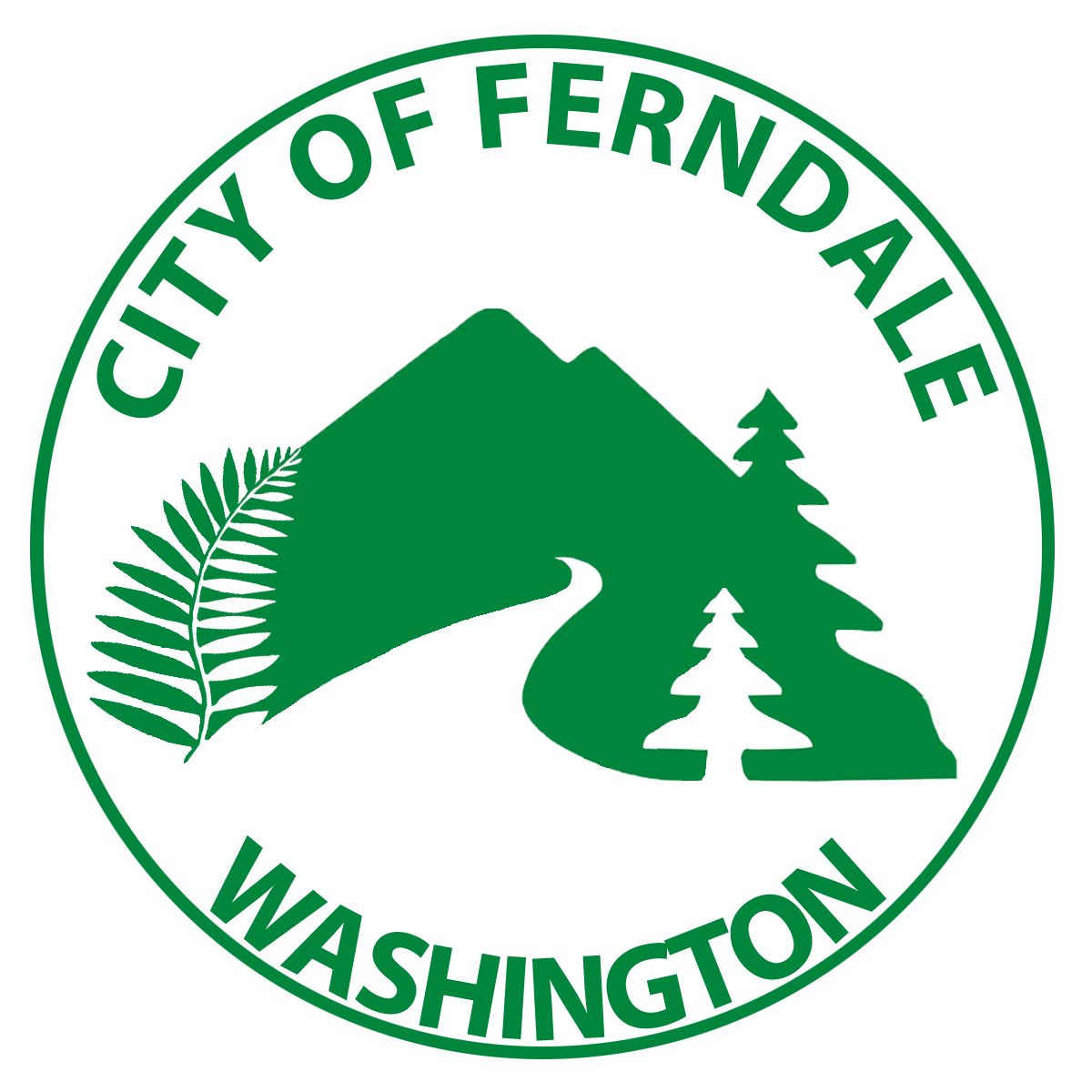 Ferndeyl Şəhərinin Gerbi